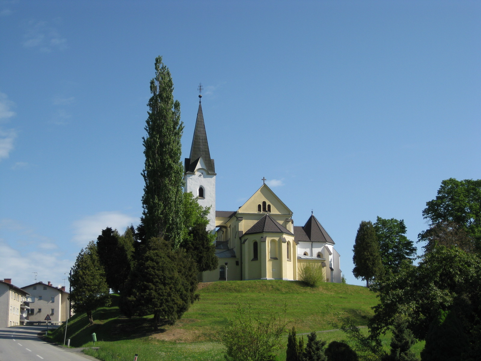 Sveti Jurij, village in Slovenia